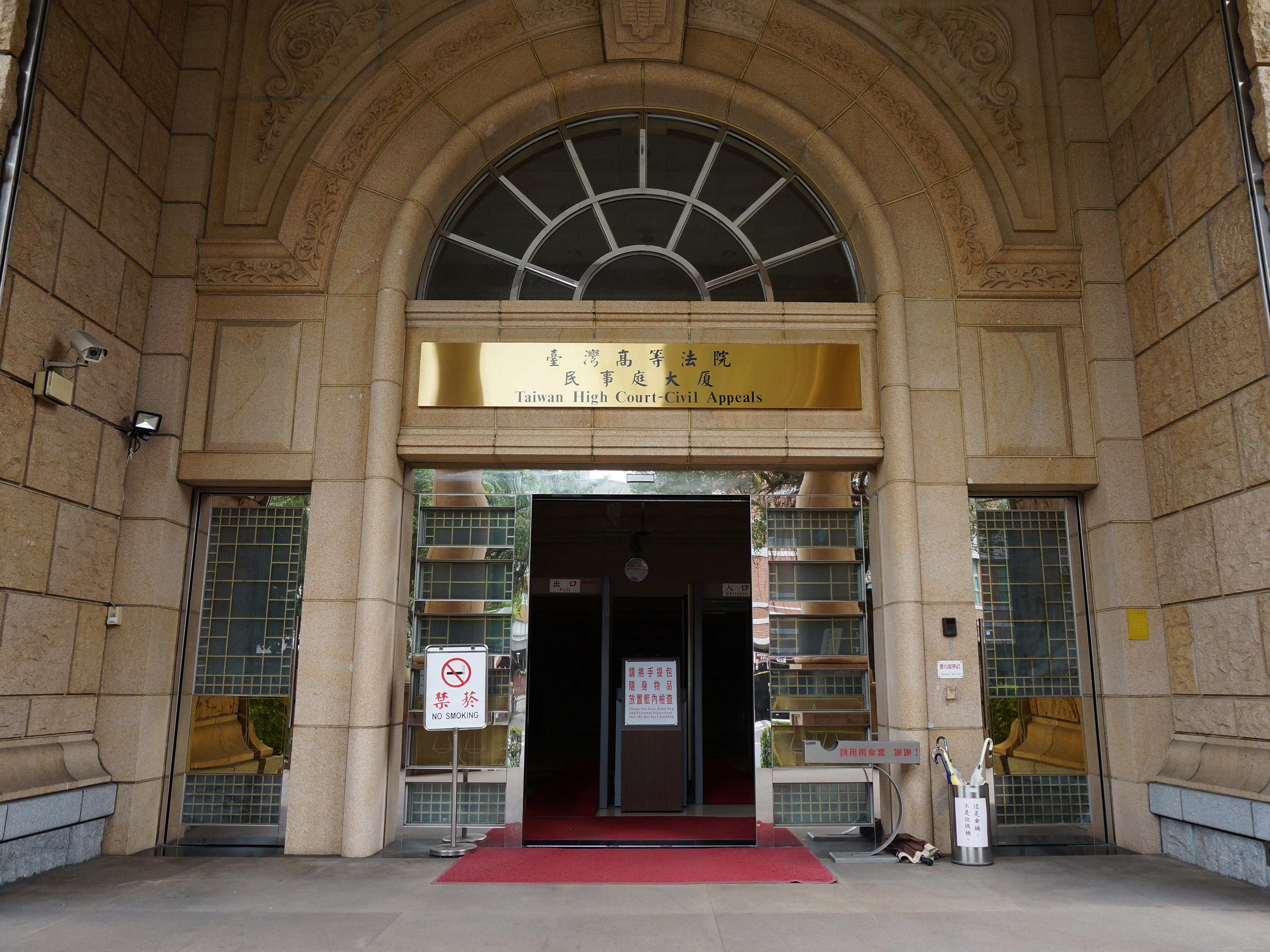 臺灣高等法院民事庭大廈大門。